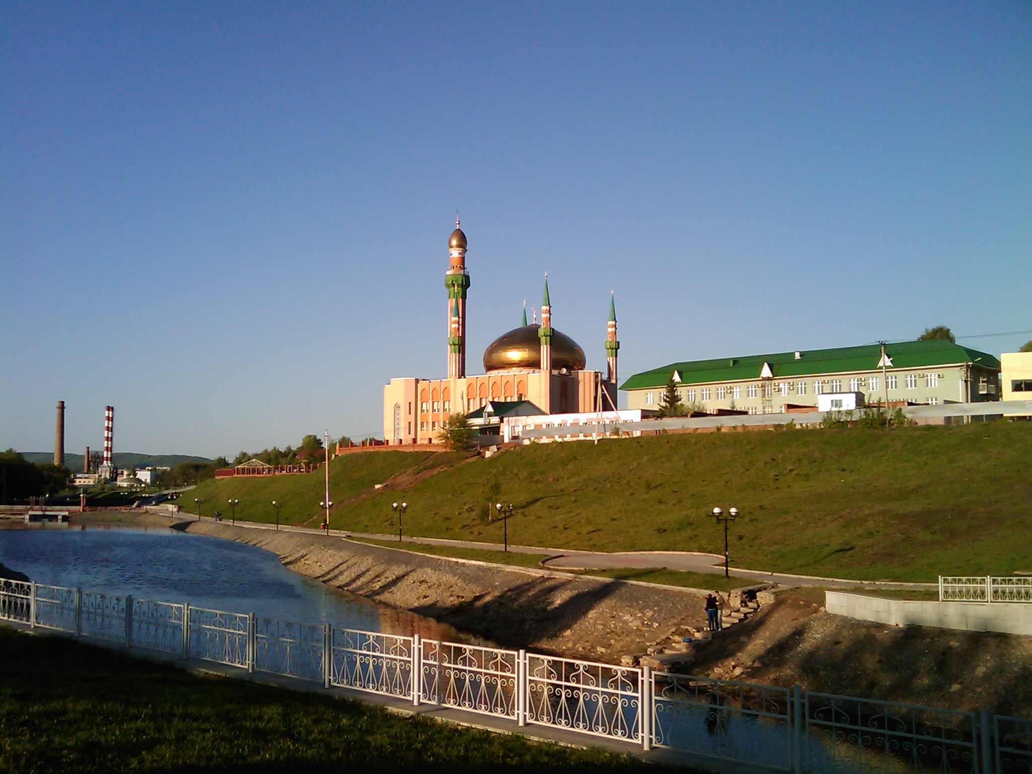 Almetyevsk, Tatarstan, Russia